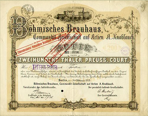 Aktie von: Böhmisches Brauhaus, Commandit Gesellschaft auf Actien A. Knoblauch Wert: 200 Thaler Preuss. Court. Maße: 35,5cm x 27,5cm Coupons: nein Auflage: 1000